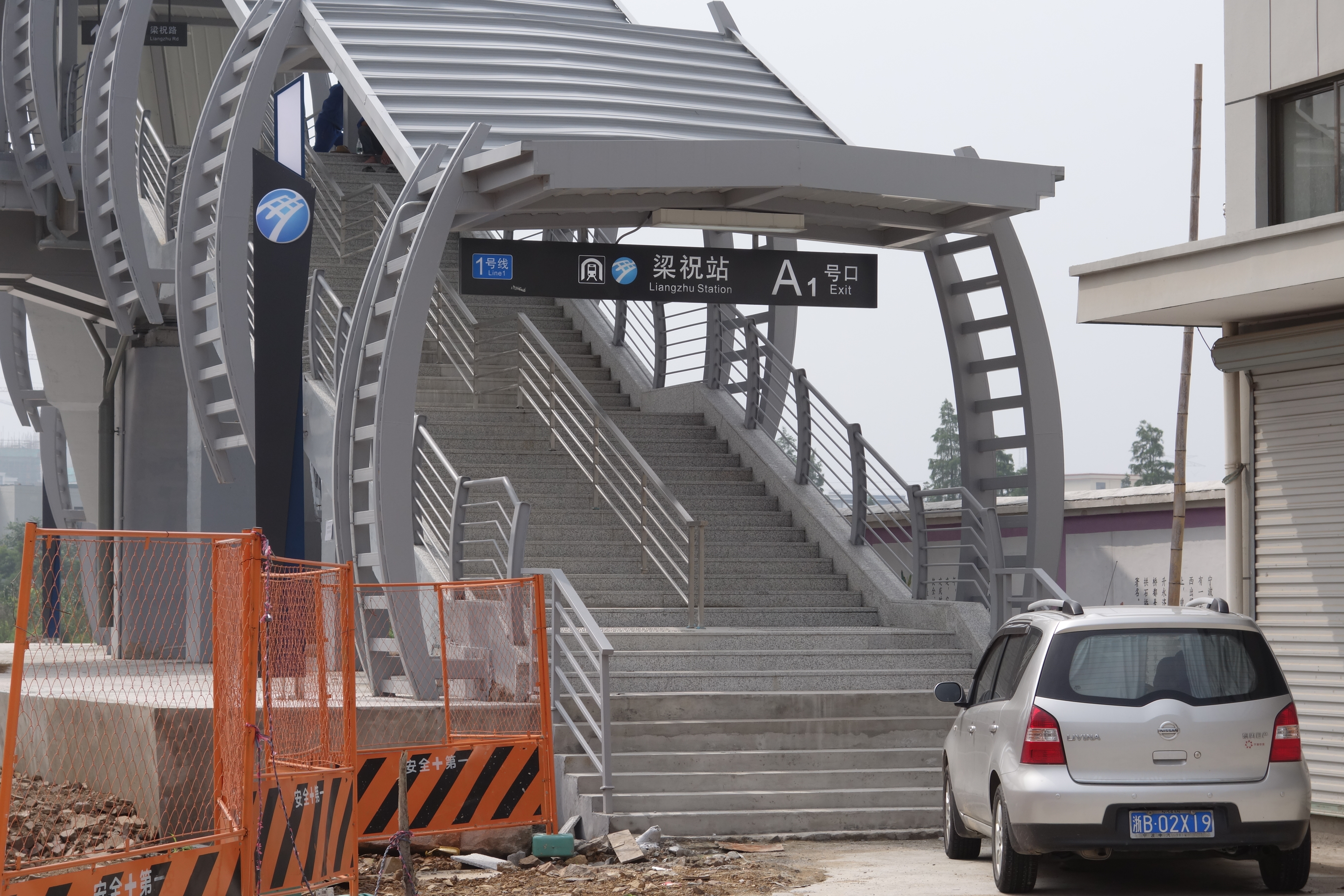 梁祝站A1口